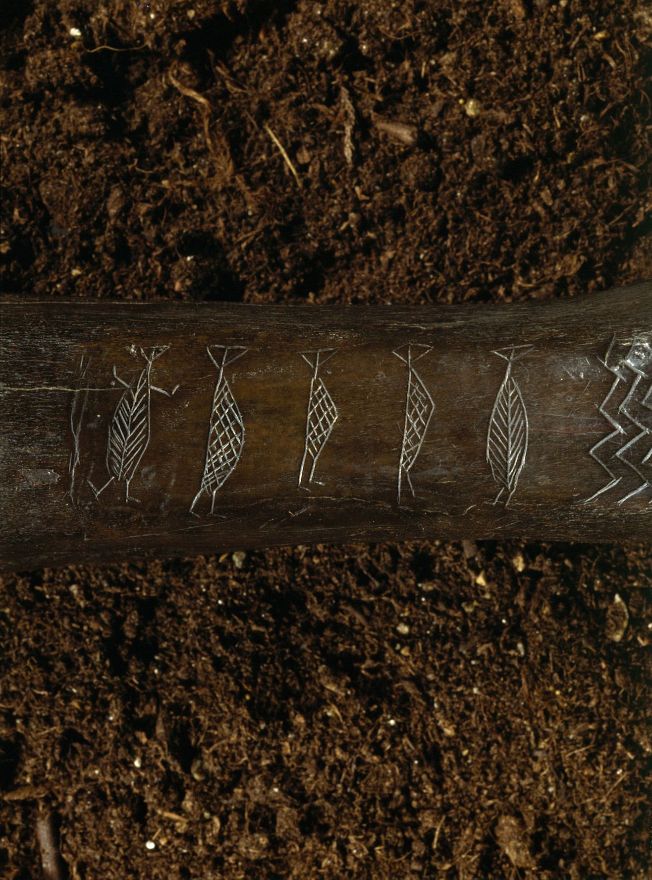 Kølle, ornamenteret. Fra Ryemarksgård, Jystrup sogn.